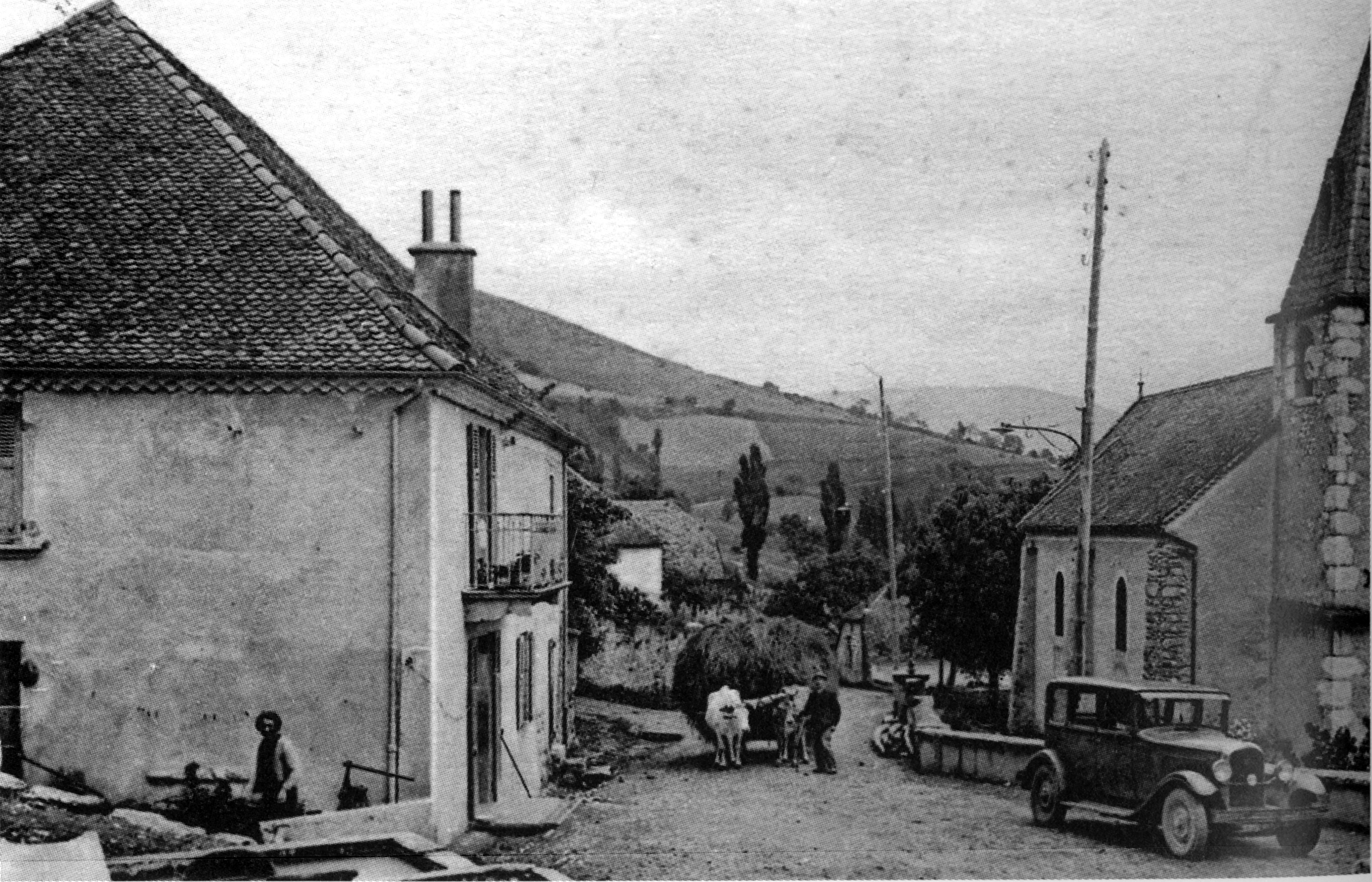 Saint-Michel-les-Portes, vers 1935